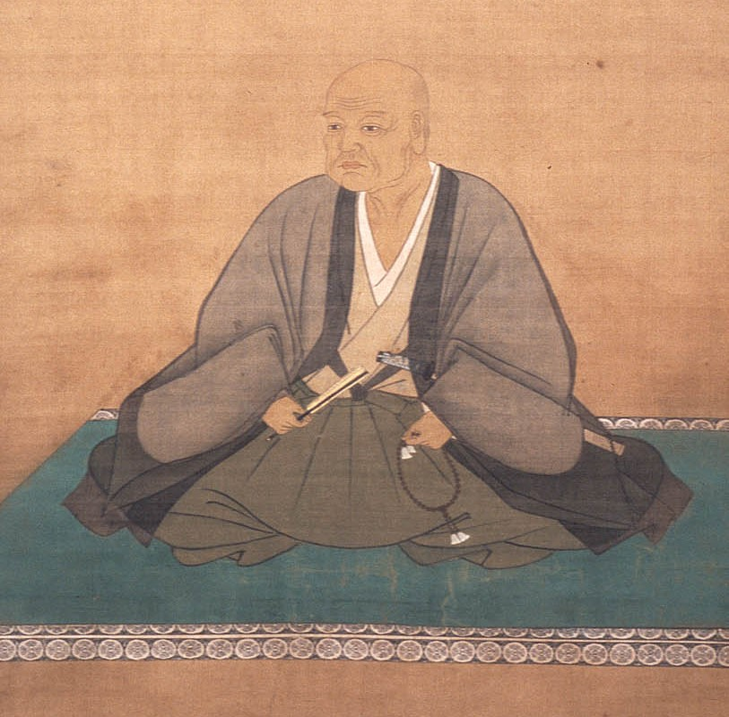 小浜藩主酒井忠勝の肖像。